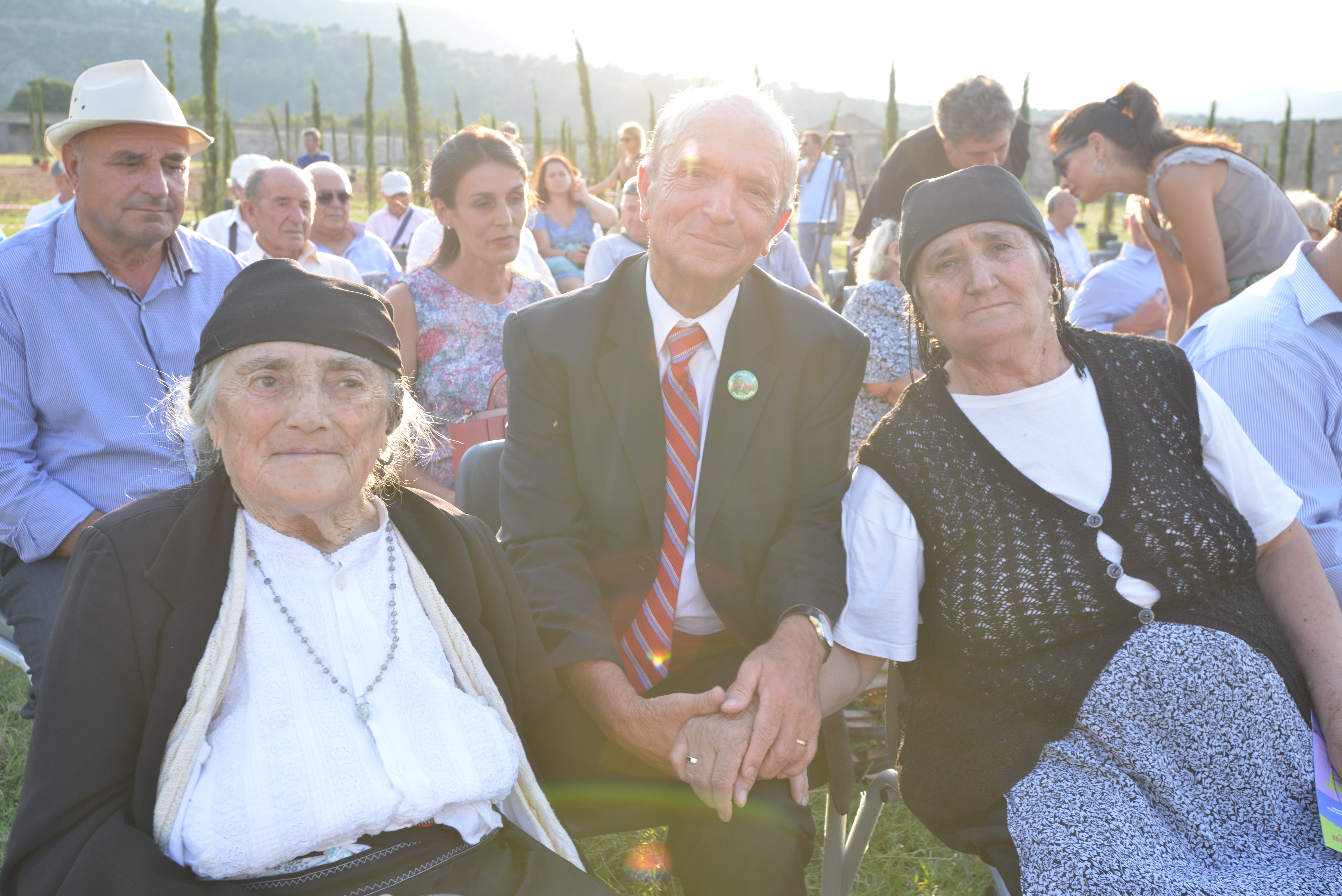 Simon Mirakaj gjatë dekorimit të Mrikë dhe Gjelë Gjikolës në ish-Kampin e Tepelenës.